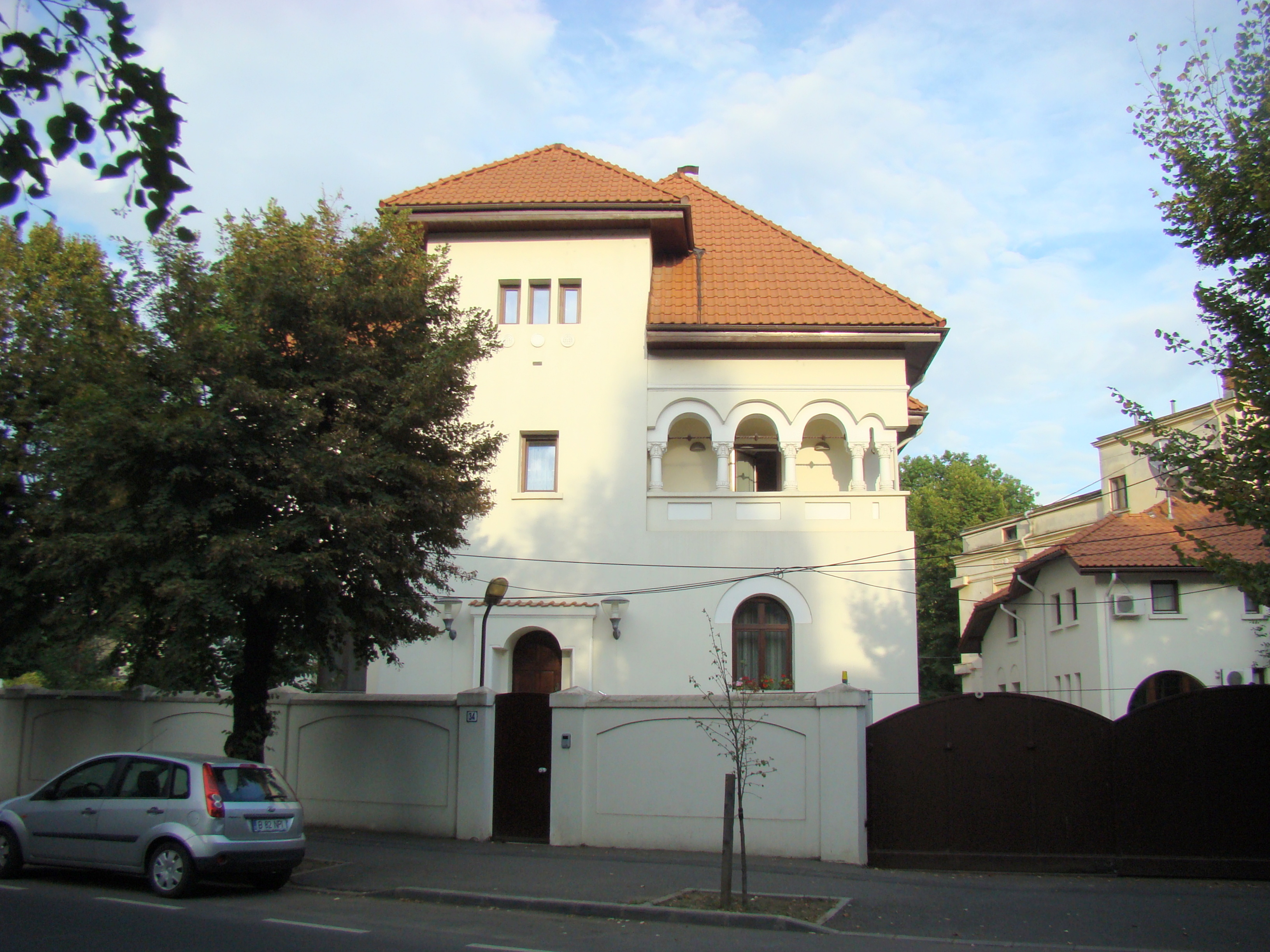 Clădire monument istoric, str. Paris, nr. 34